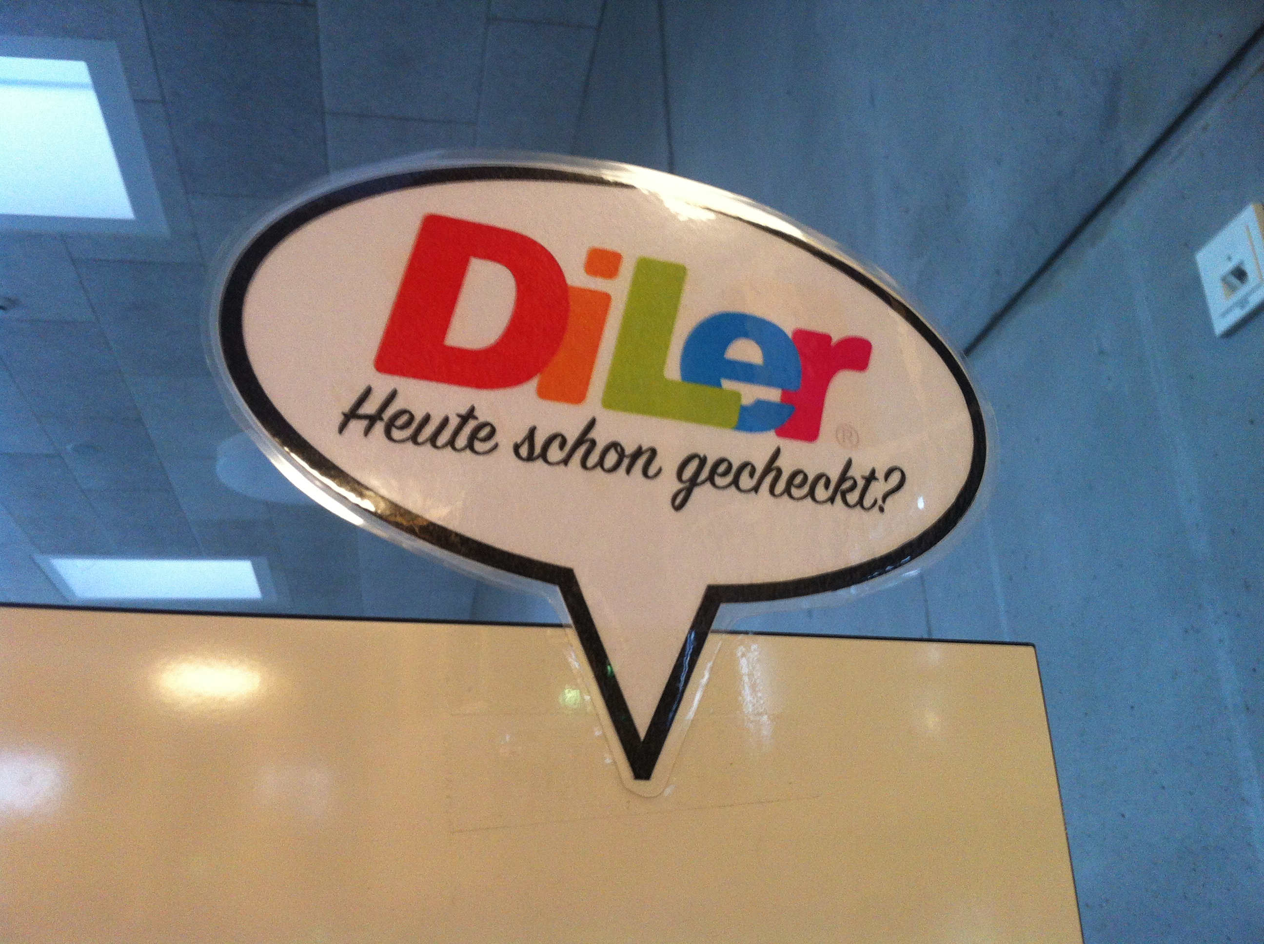 ASW Alemannenschule (Gemeinschaftsschule) in Wutöschingen im Landkreis Waldshut in Baden-Württemberg. (Lernumgebung DiLer).